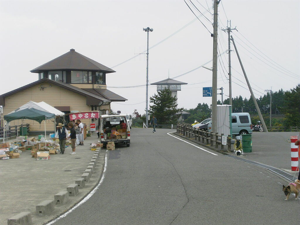 紀泉高原スカイライン・ハイランドパーク粉河駐車場付近